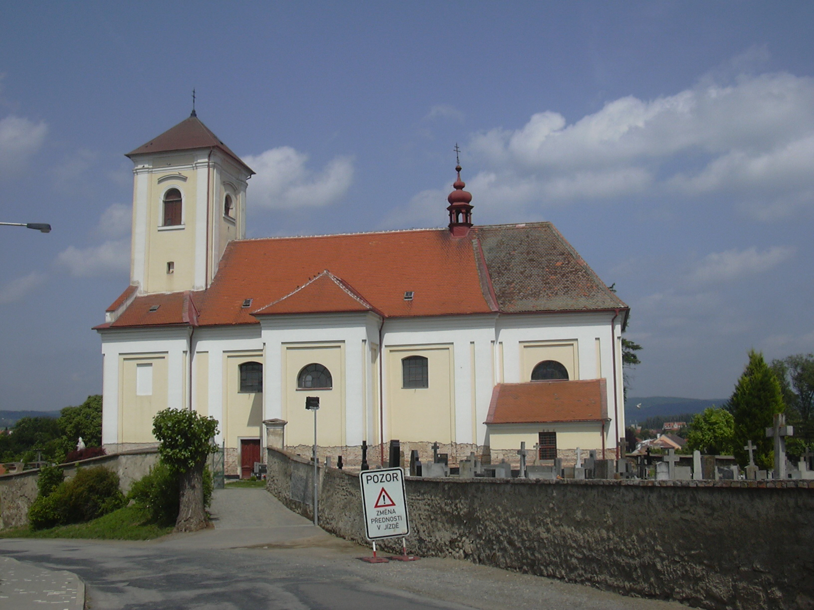 Farní kostel sv. Václava (Rousínov - Czech Republic)